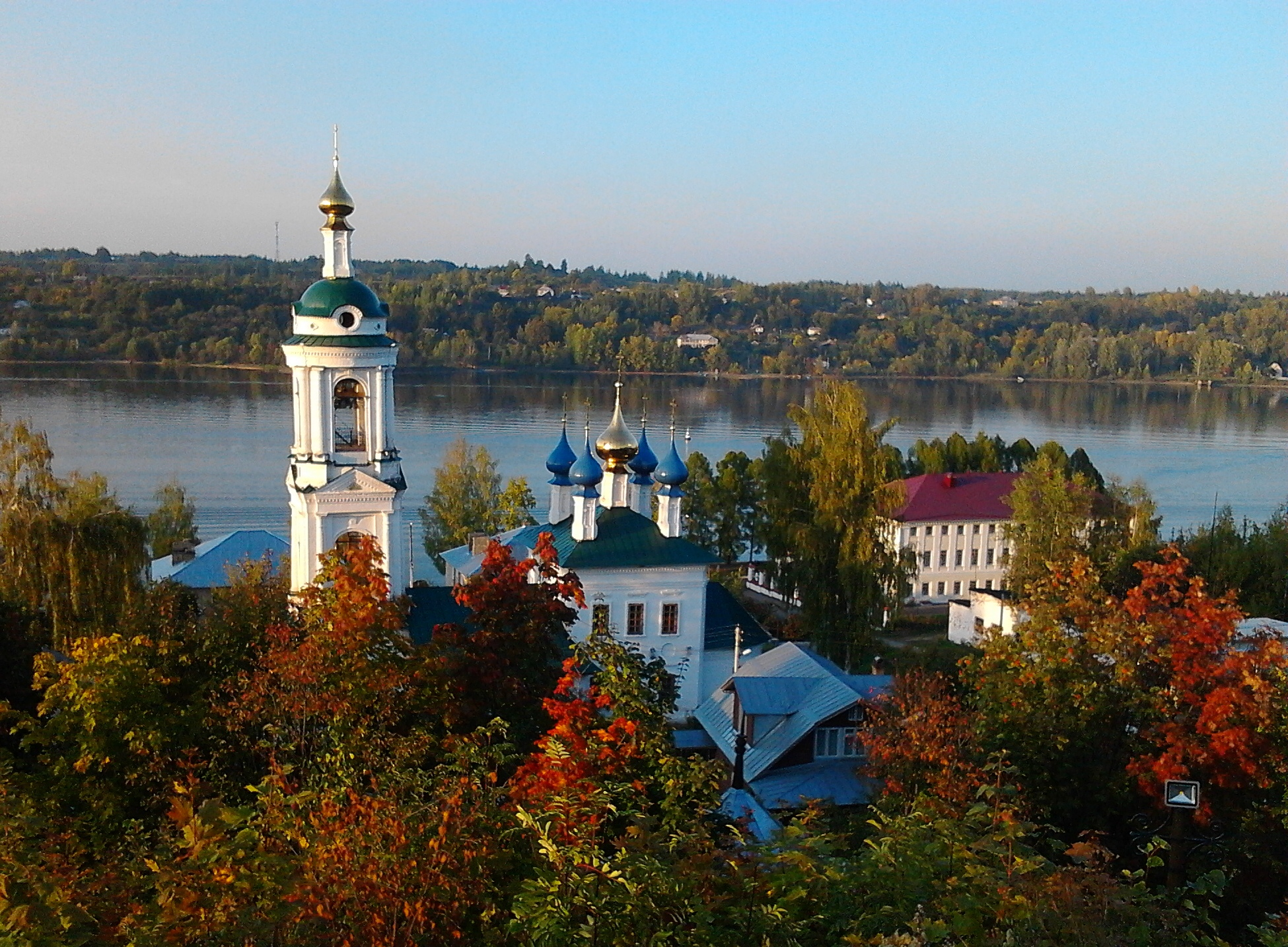 исторический центр: Плёс, Приволжский район, Ивановская область